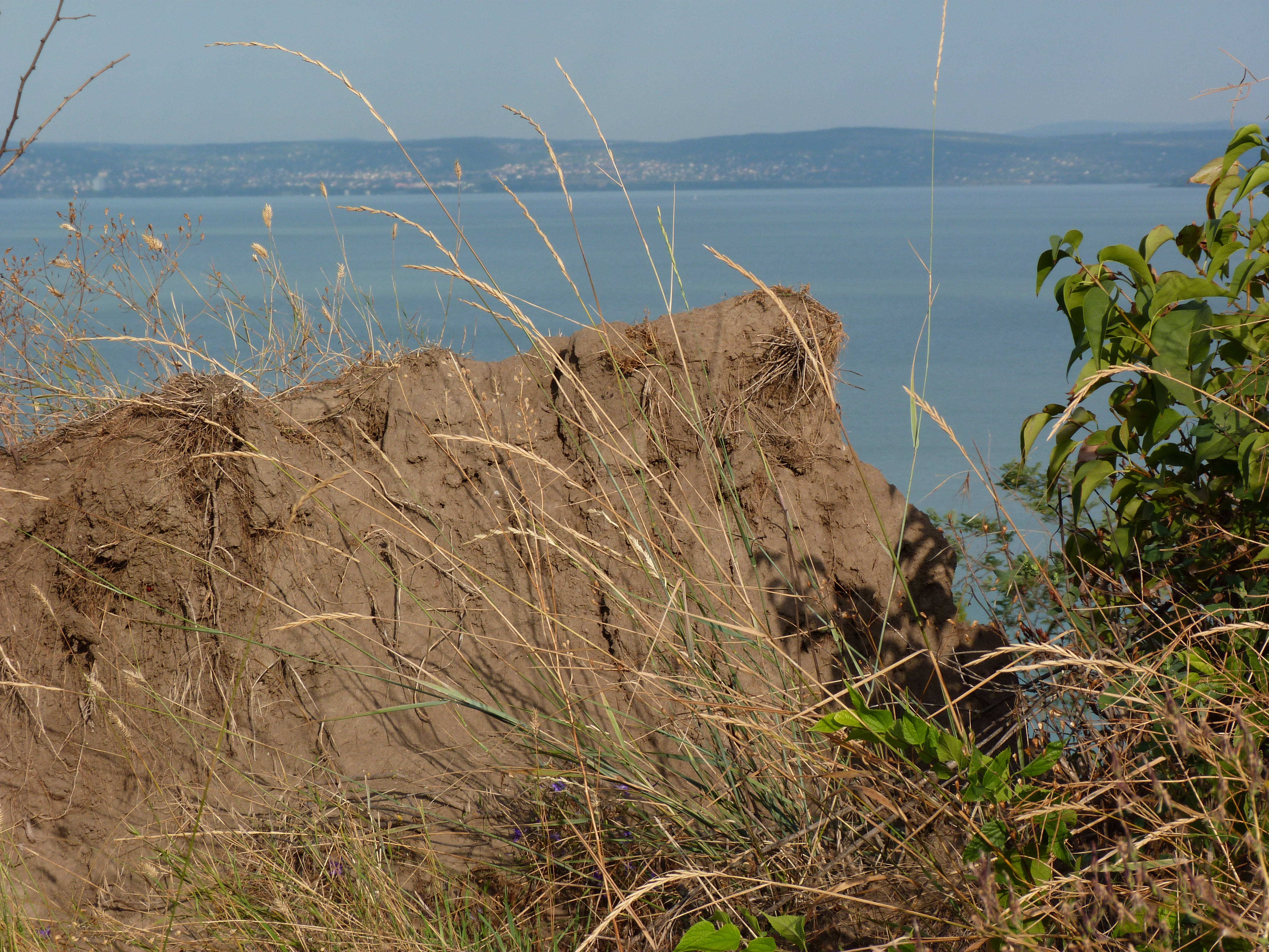 A felvétel 2013. szeptember 6 -án, pénteken készült Balatonakarattyán, a Magasparton. Kilátás a Bercsényi utca előterében. Suvadás. A helyiek szájhagyománya szerint az 1900 -as évek elején megcsúszott a löszfal. A Bercsényi utca előtti, Balaton felé eső terület lesűllyedt, szélén ma is láthatóak a kevésbé megsüllyedt löszfaldarabok. Azóta a partfal stabilizálása, a vízelvezetés megoldása miatt a partoldal nem csúszik. ©© Derzsi Elekes Andor, Budapest, 2013, You are authorised to use these photos and vids under Creative Commons – even for commercial, for profit purposes. Photos must be attributed to Derzsi Elekes Andor. All of the photos and vids in the Metapolisz DVD line are under Creative Commons and can be used even for commercial – for profit – purposes. Recommended Citation Derzsi Elekes Andor: Metapolisz DVD line